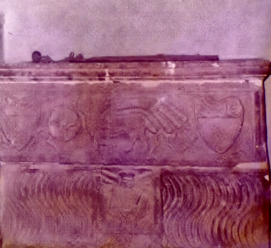 Il sepolcro attribuito dalla tradizione al conte Enrico II di Ventimiglia, conte del Maro, Ischia e Geraci, conservato nel duomo S. Salvatore di Cefalù. Nel testamento del nipote Francesco II si rammenta che nella cattedrale di Cefalù era pur conservata la tomba del padre Aldoino I conte d'Ischia. Enrico, secondo i più recenti studi, fece ricostruire il tetto a capriate della cattedrale e completare la parte superiore dello splendido duomo in stile ligure.